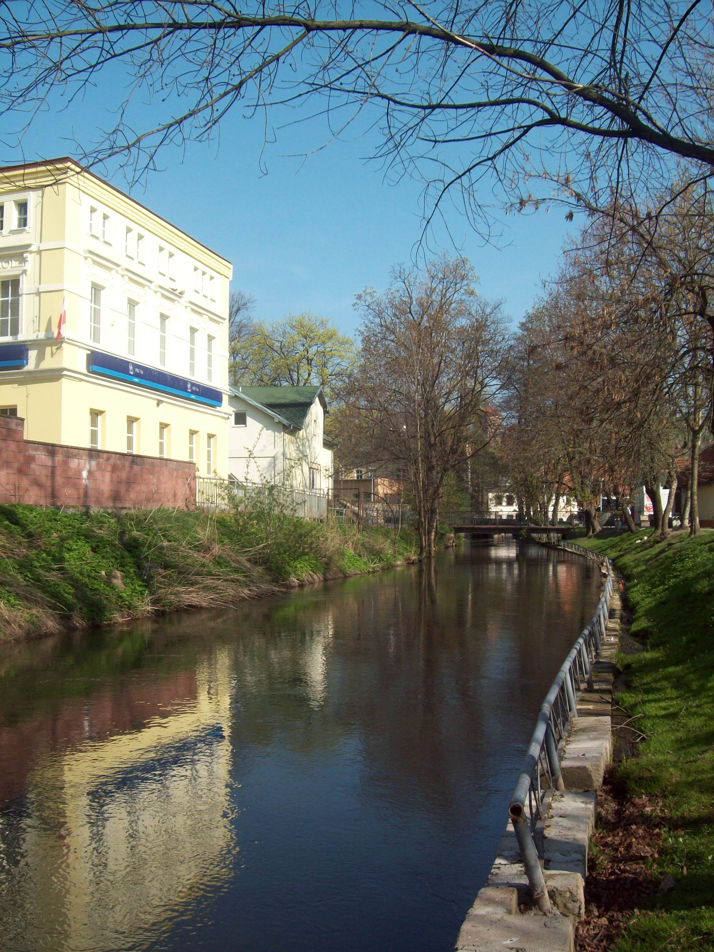 Młynówka w okolicy al. Dunikowskiego w Kłodzku